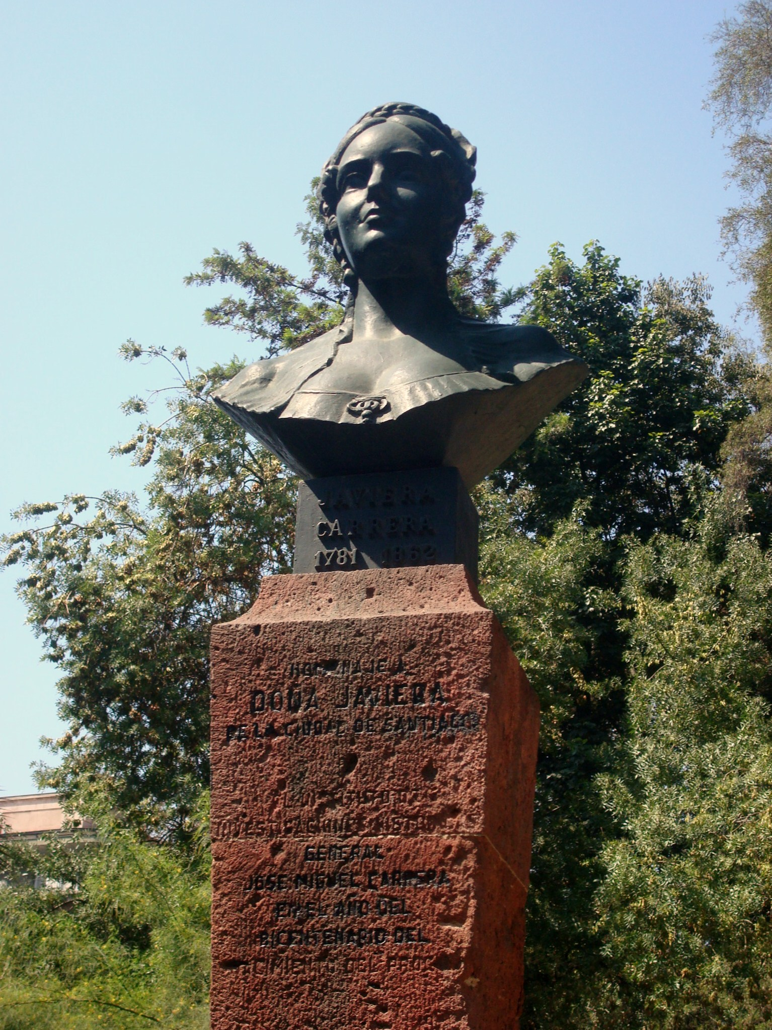 Busto de Javiera Carrera, Cerro Santa Lucía, Santiago Centro, Chile